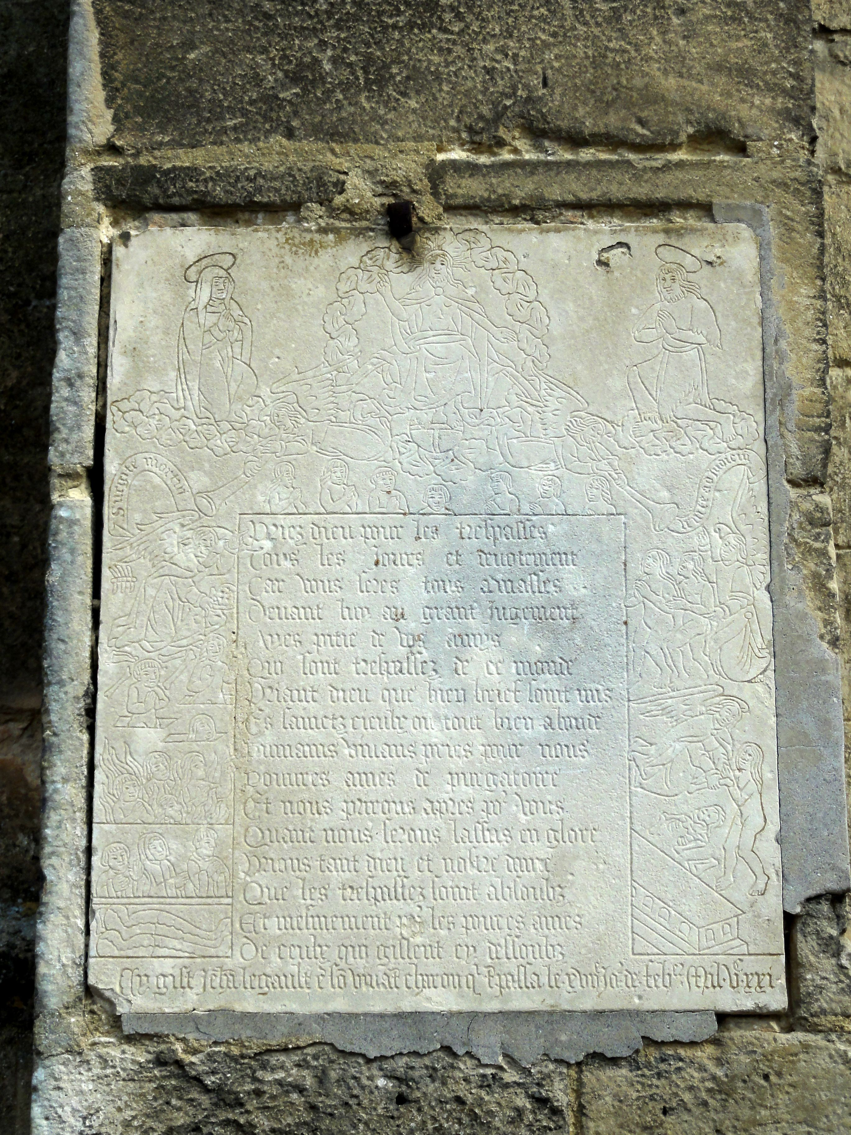 Dalle funéraire de Jehan Legault, charron, mort le 18 février 1521. L'épitaphe est entourée d'une représentation du Jugement Dernier. La dalle provient du dallage du sol de l'église, mais est fixée à l'extérieur de l'église depuis une date relativement récente.